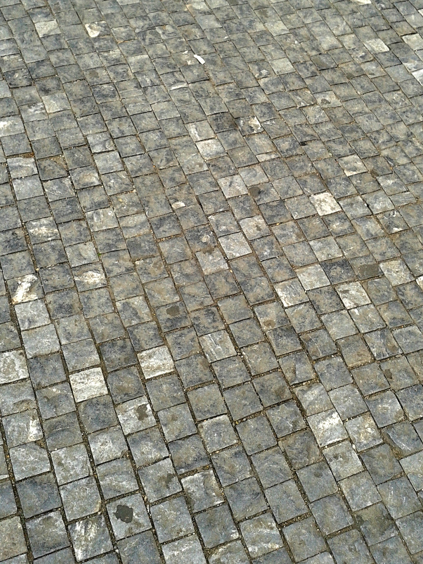 Dlažební kostky na chodníku před pražským obchodním domem Nový Smíchov